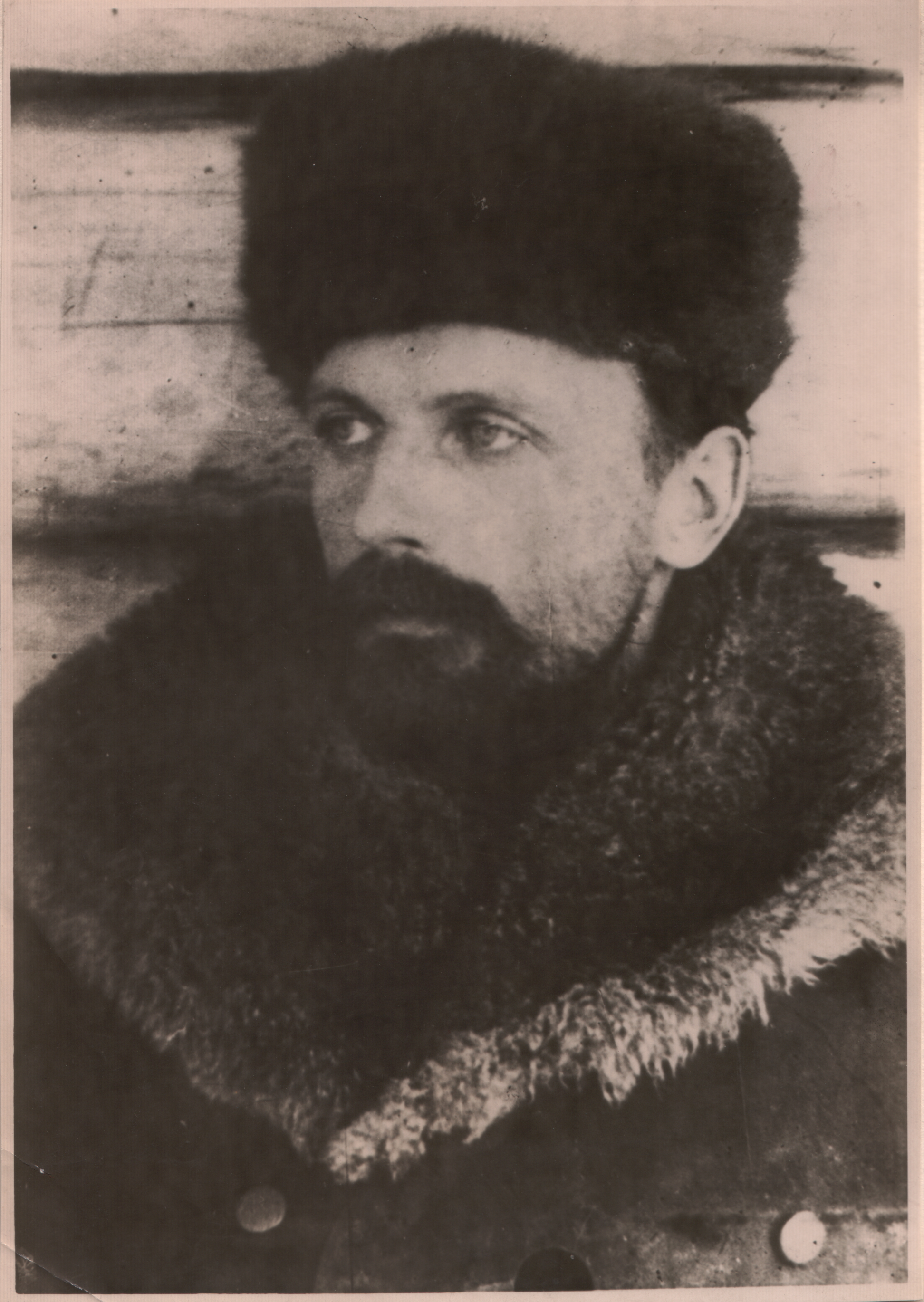 Bronisław Wesołowski (1870-1919) - komunista polski